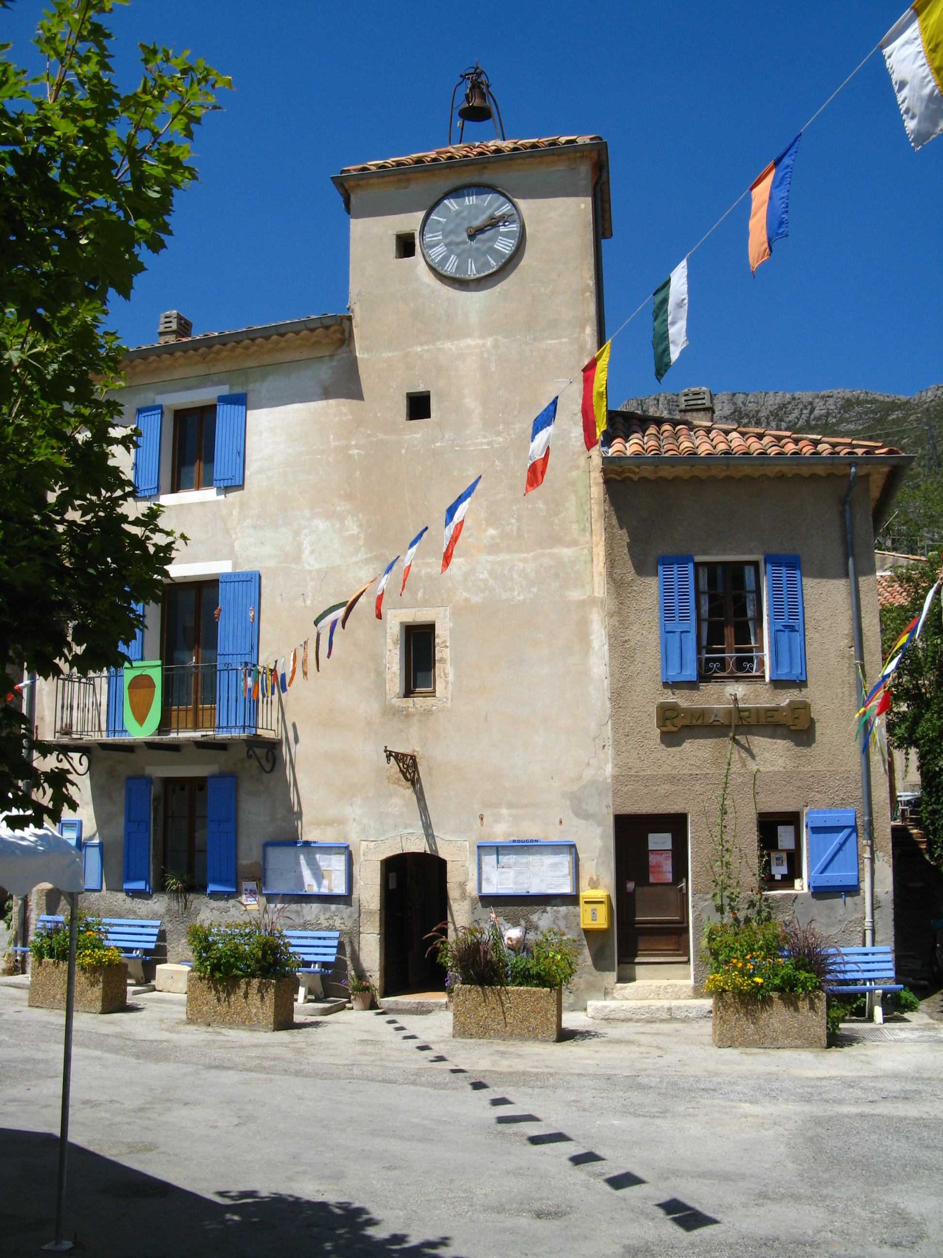 La Mairie de Rougon (Alpes-de-Haute-Provence)